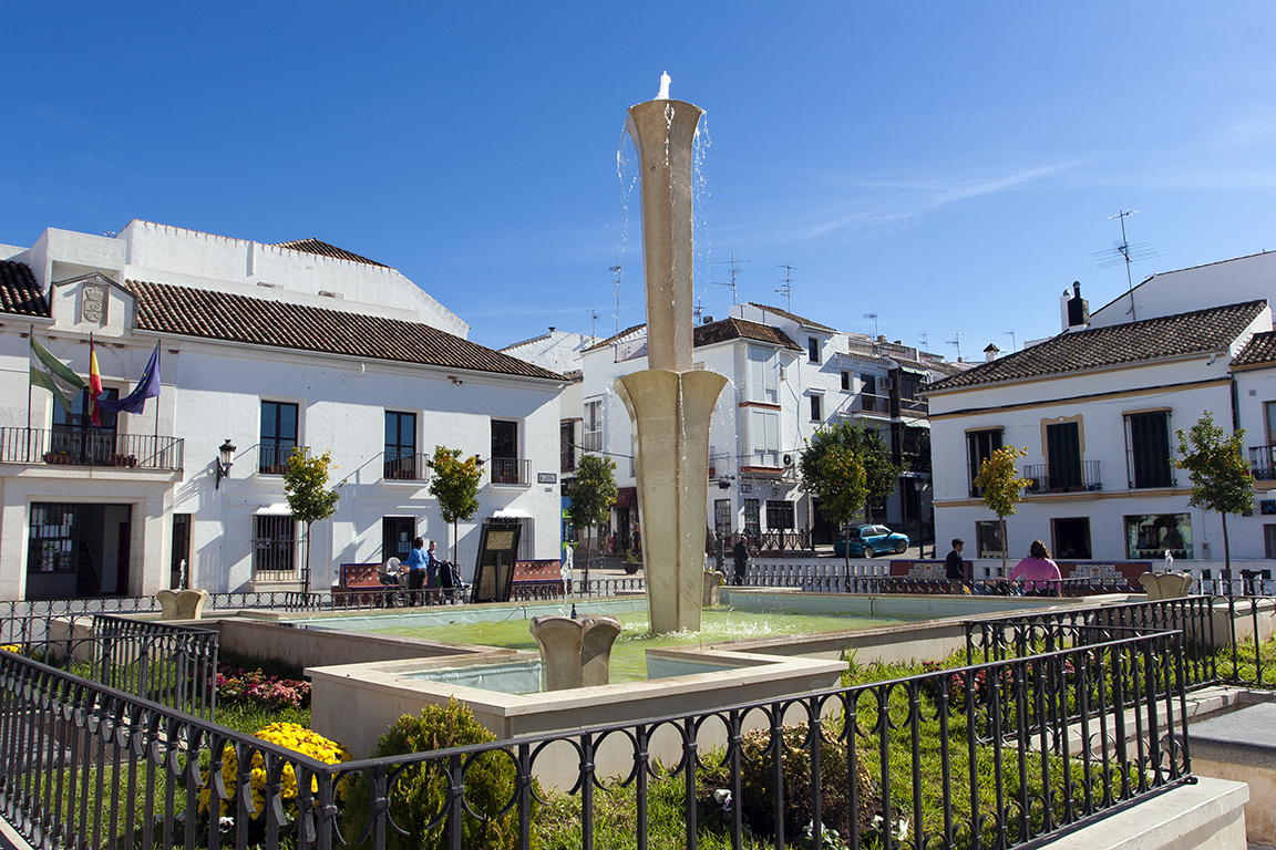 Plaza de la Constitución, en Prado del Rey (Cádiz; España), una de las poblaciones incluidas dentro del itinerario denominado como «la ruta de los pueblos blancos».